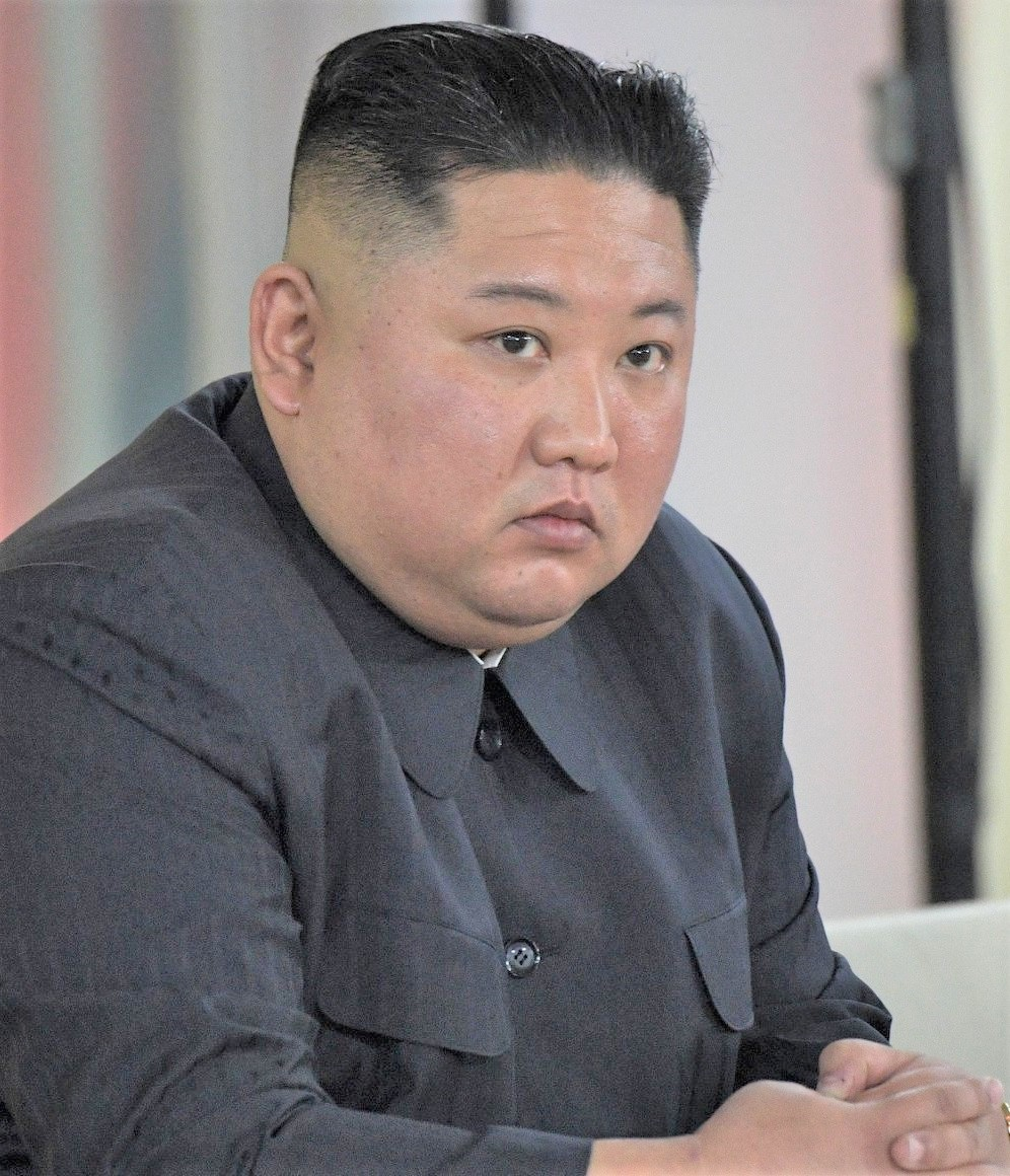 В ходе российско-северокорейских переговоров в расширенном составе. Председатель Государственного совета КНДР Ким Чен Ын. Россия, Владивосток, остров Русский.